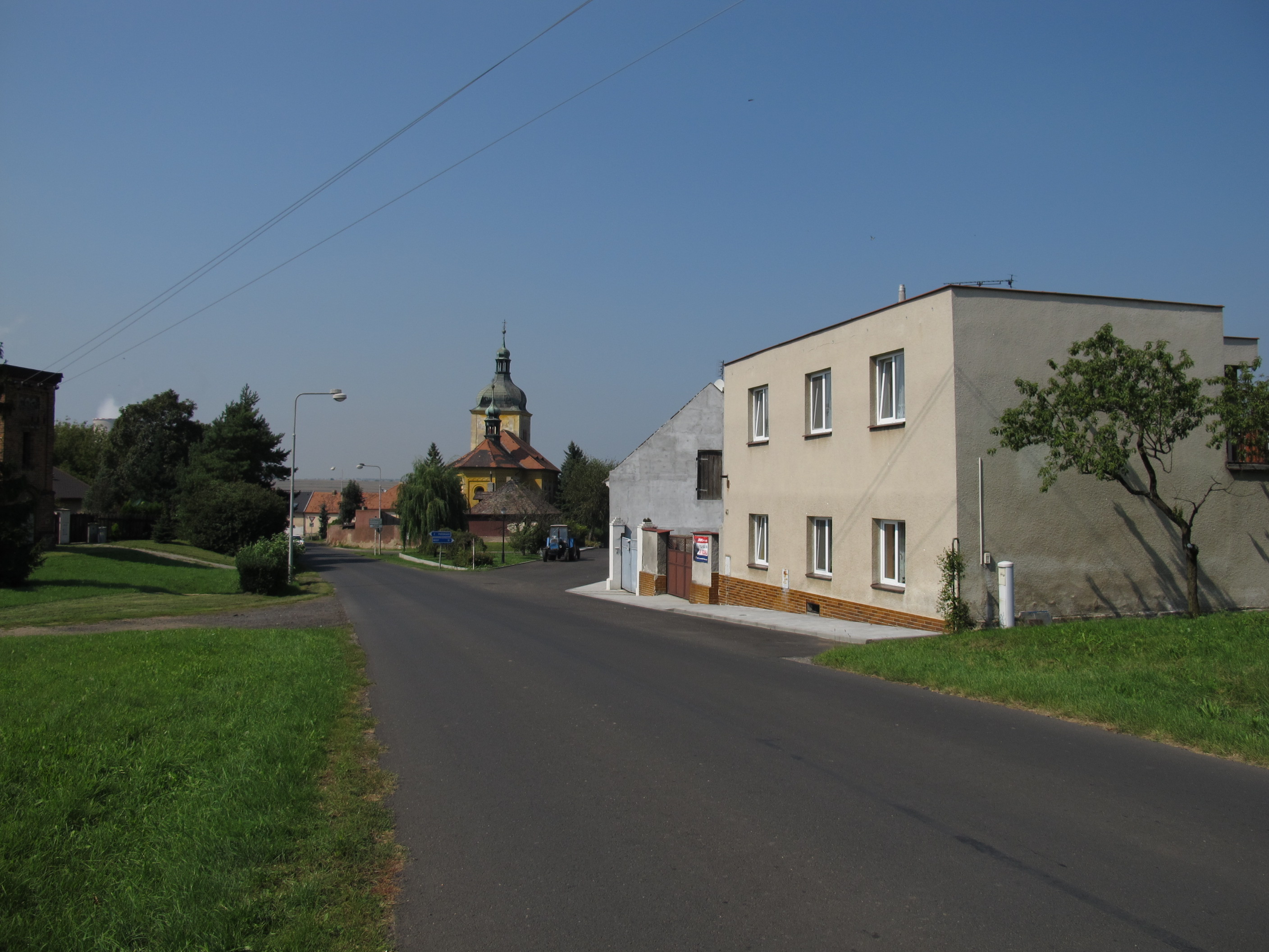 Obec Volevčice, okres Most